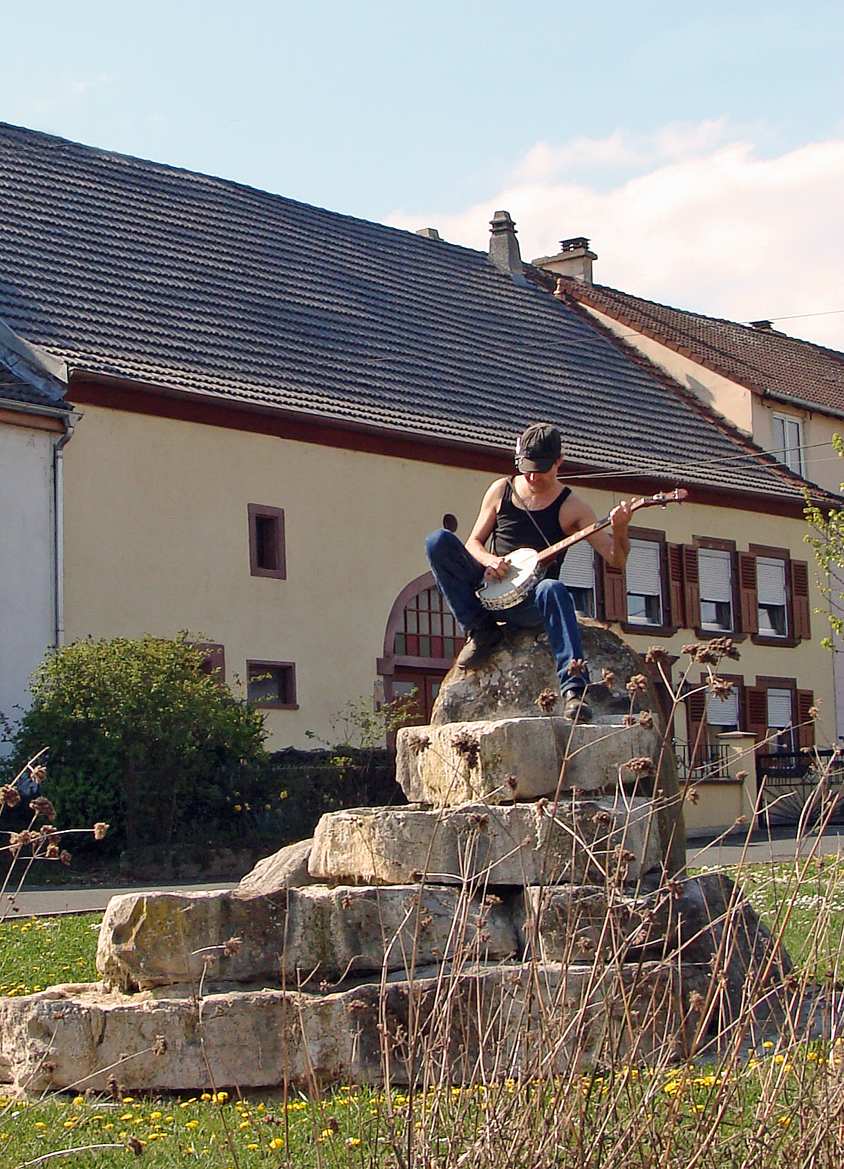 Joueur de banjo sur la place du village d'Ellviller (commune de Loupershouse)